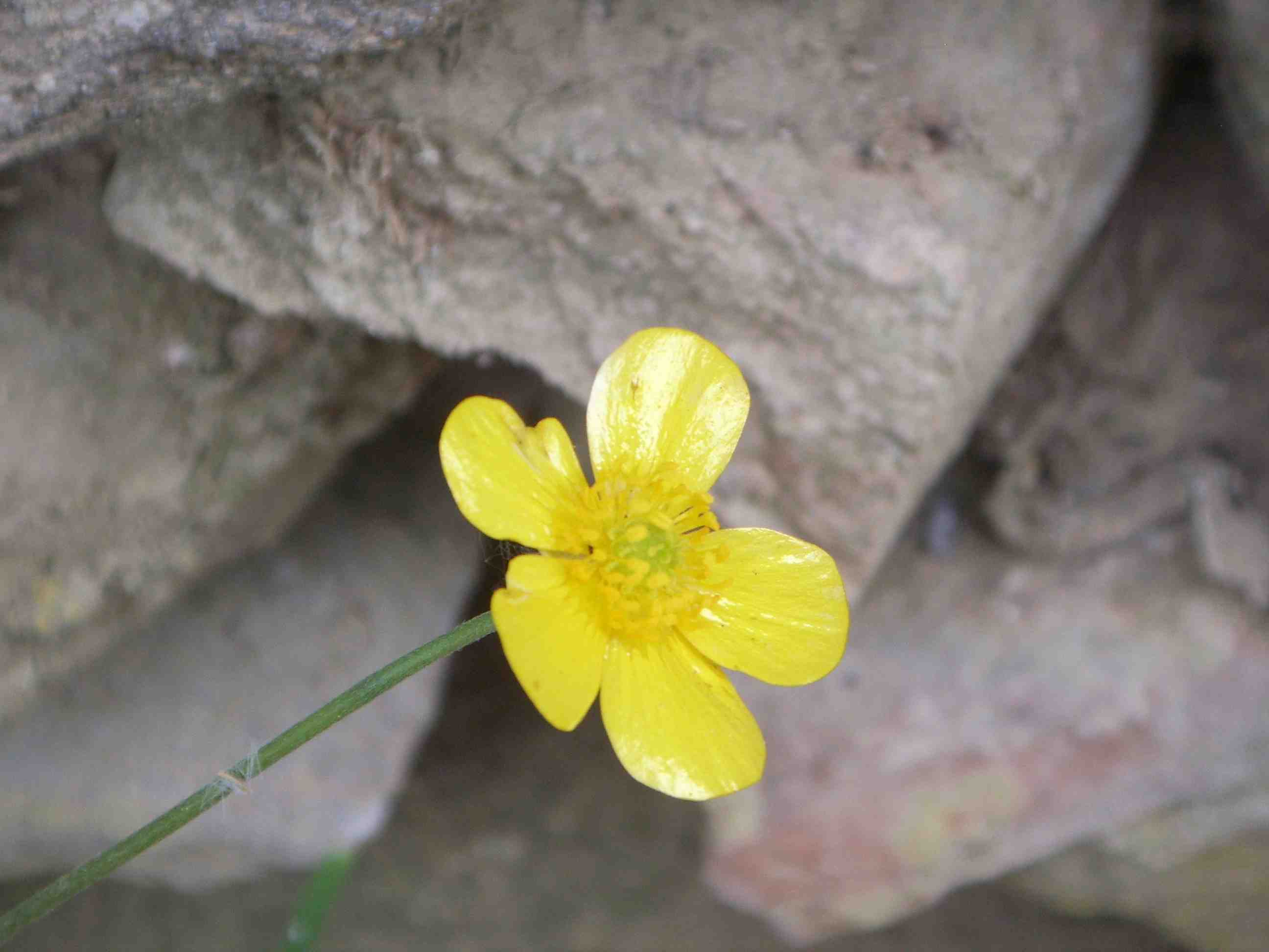 Fiore di ranuncolo "Foto scattata da me (Pepp.cristiano 18:44, 20 mag 2006 (CEST), Giuseppe Cristiano), la rilascio nel pubblico dominio